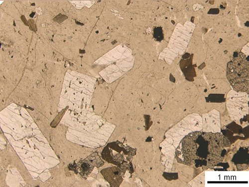 Dacite. nicol paralleli